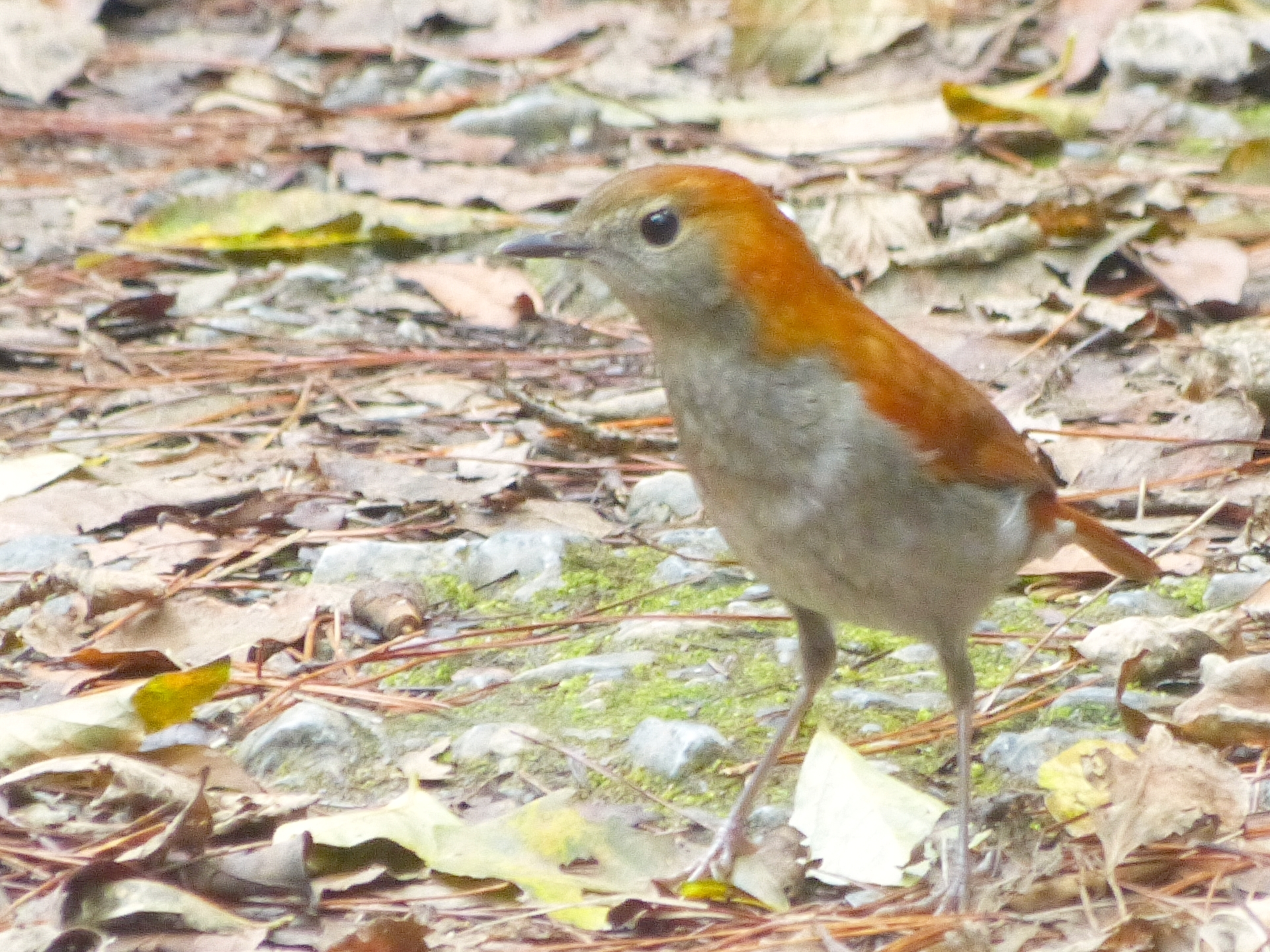 アカヒゲ Luscinia komadori のメス（沖縄県国頭村）